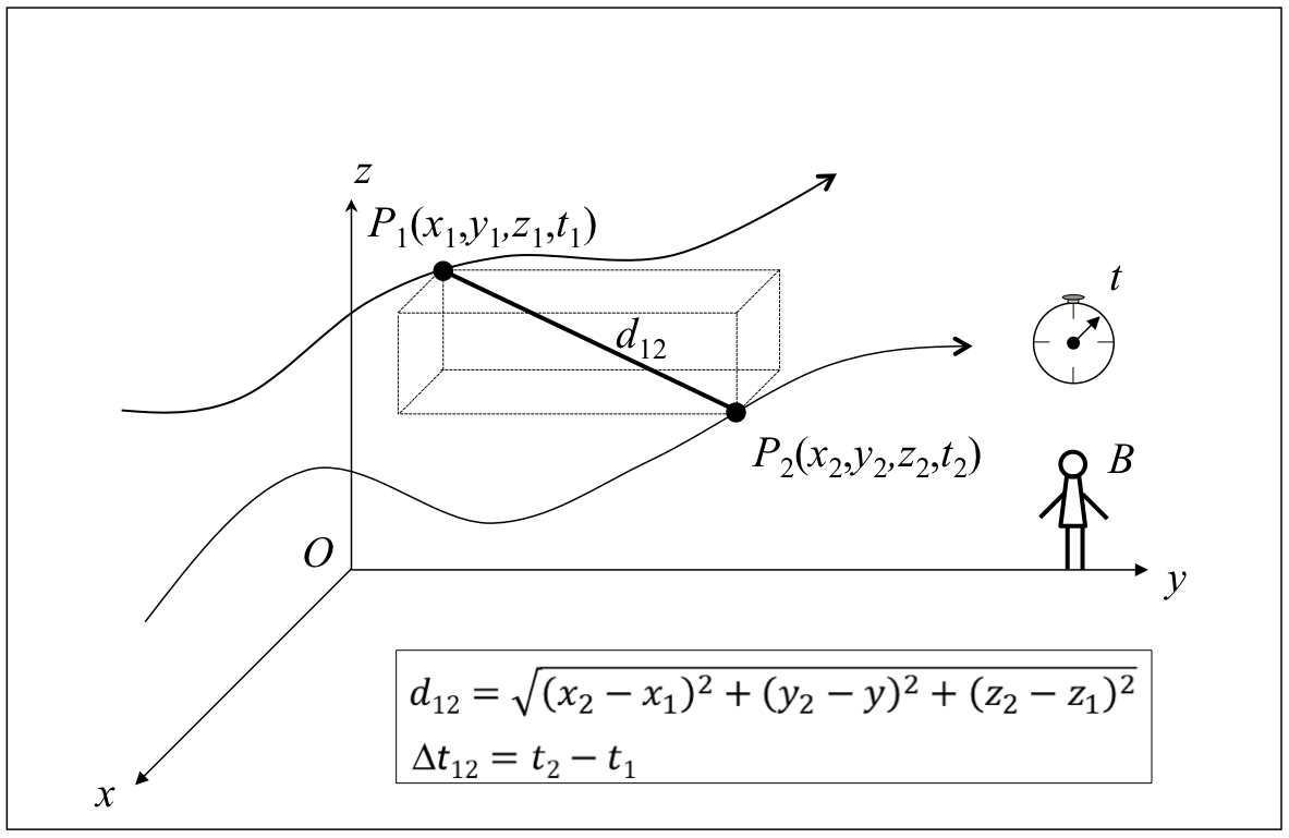 Bi gertaera puntualen arteko distantzia espaziala eta denbora-tartea.